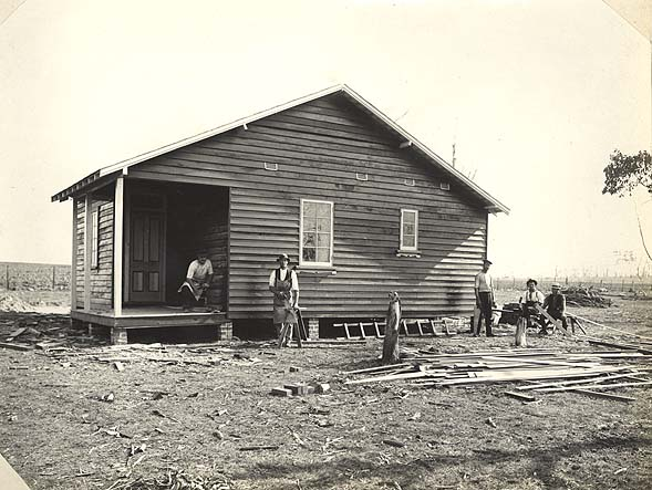 Kentucky Soldier's Settlement Estate - Settler's Cottage